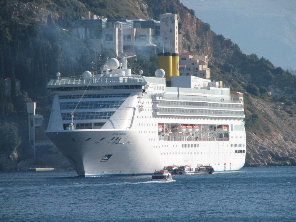 Costa Victoria liegt vor Dubrovnik (Nov.2005) Olpa Dies war das letzte Anlaufen Dubrovniks im Jahr 2005. Nach Beendigung dieser Kreuzfahrt in Venedig wurde das Schiff nach Savona überführt und für die Wintersaison 2005/2006 in Südamerika vorbereitet.